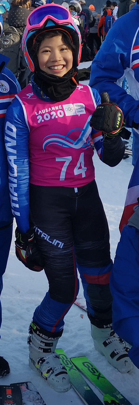 La skieuse thaïlandaise Nichakan Chinupun et son équipe après le slalom géant sux Diablerets.